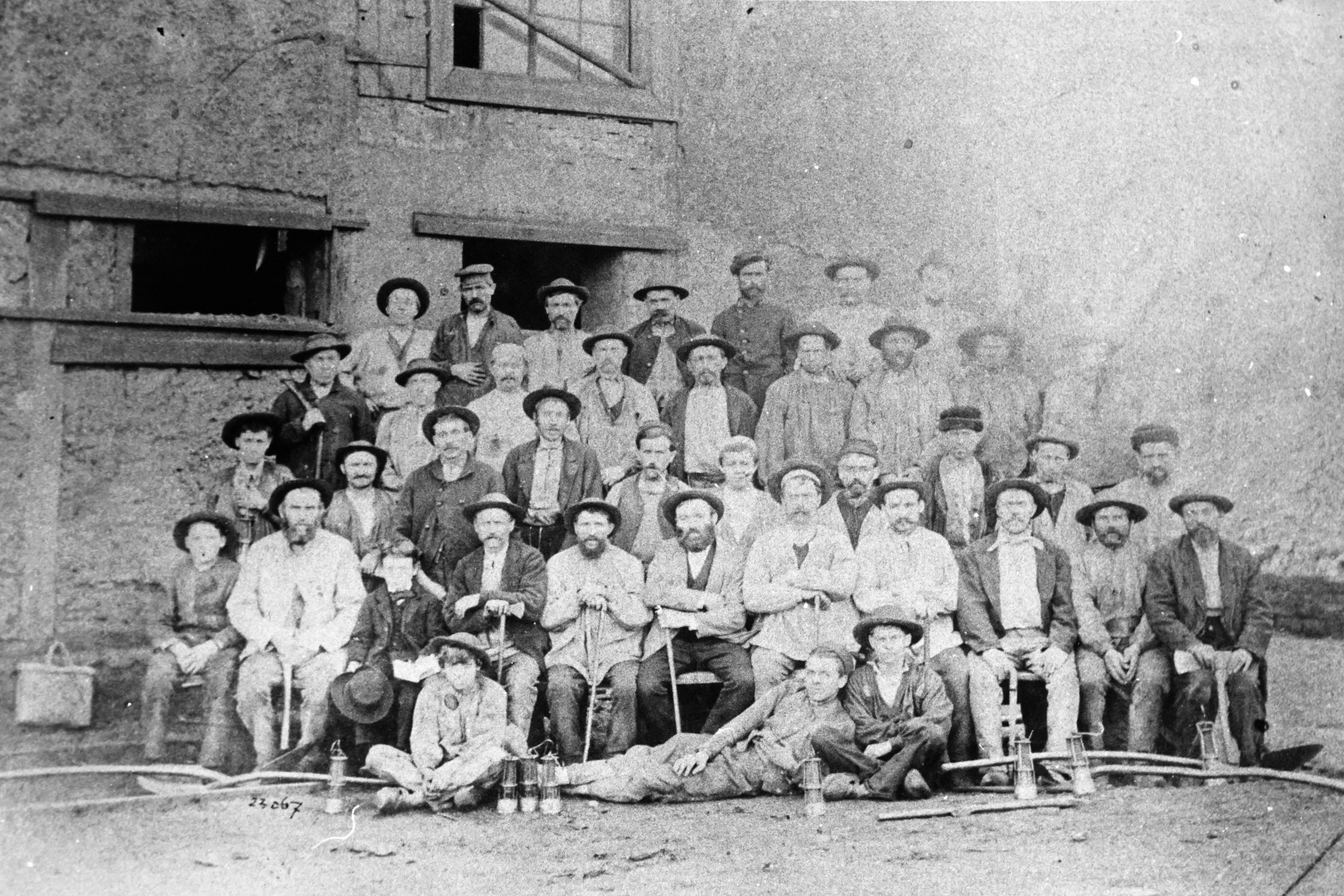 Des mineurs au puits Saint-Charles (Ronchamp).